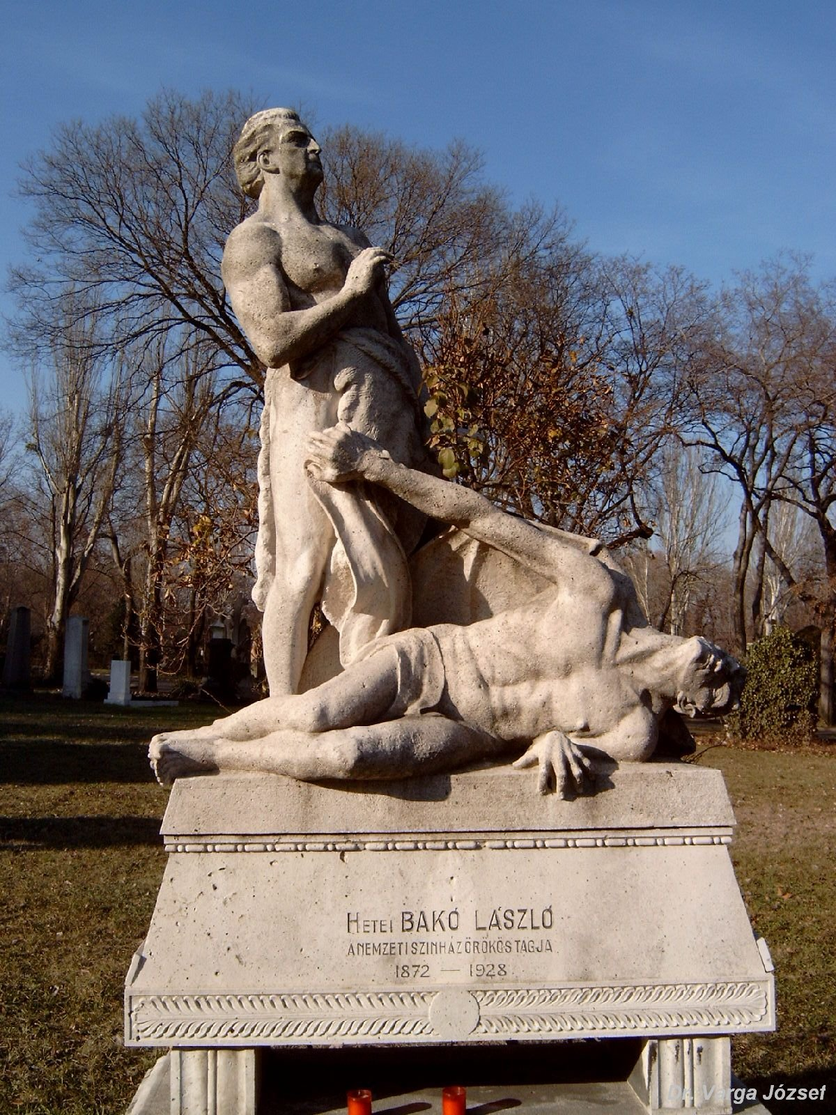 Bakó László (Sárközújlak, 1872. november 21. – Bp., 1928. augusztus 5.) színész sírja Budapesten. Kerepesi temető: 35-9-14 [szobrász: Homonnay Jenő]